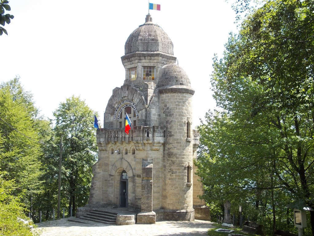 Monument in forma de obuz ridicat in memoria eroilor cazuti in Primul razboi mondial